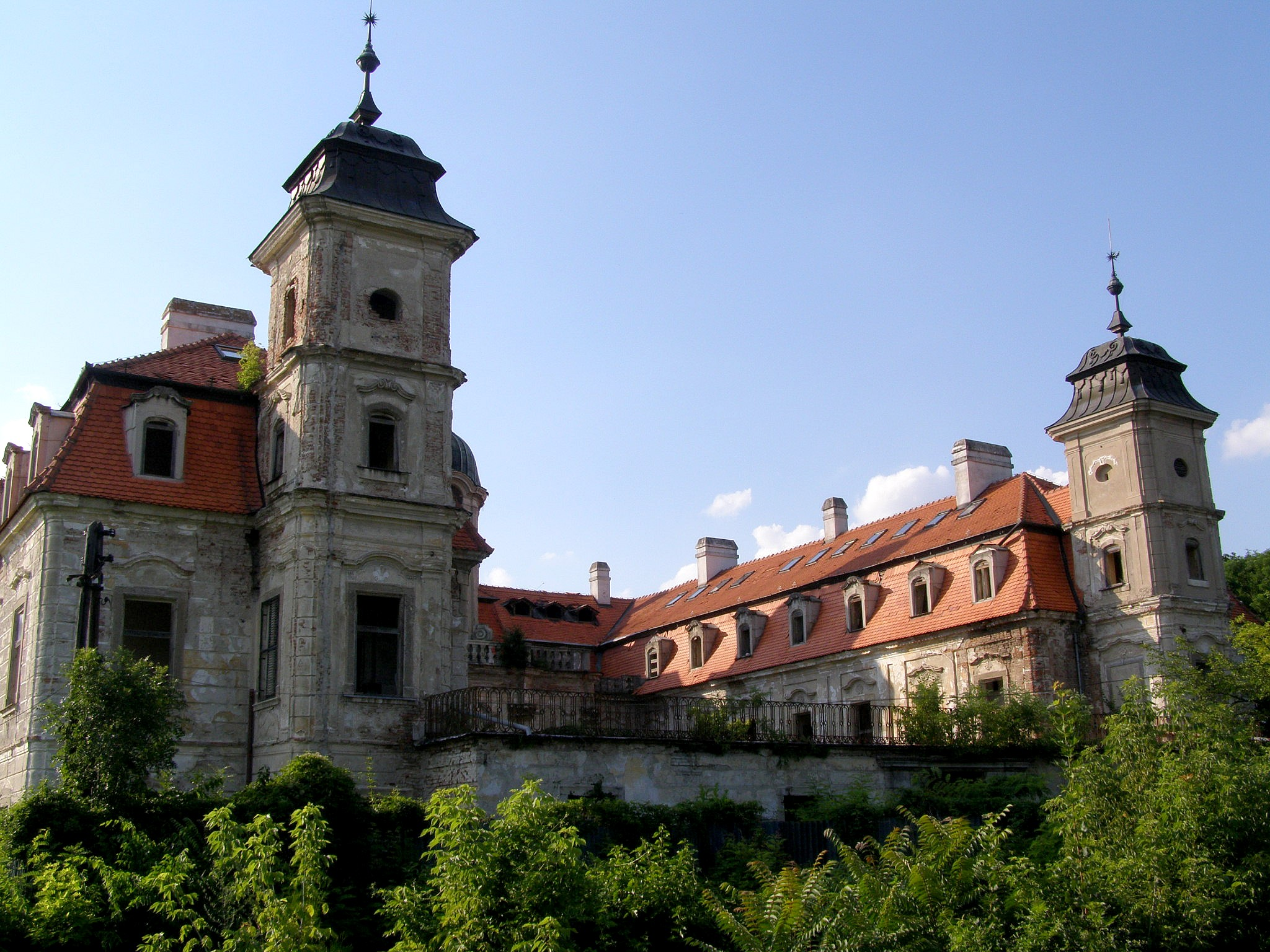 Hlavné priečelie kaštieľa v Bernolákove má juhovýchodnú orientáciu